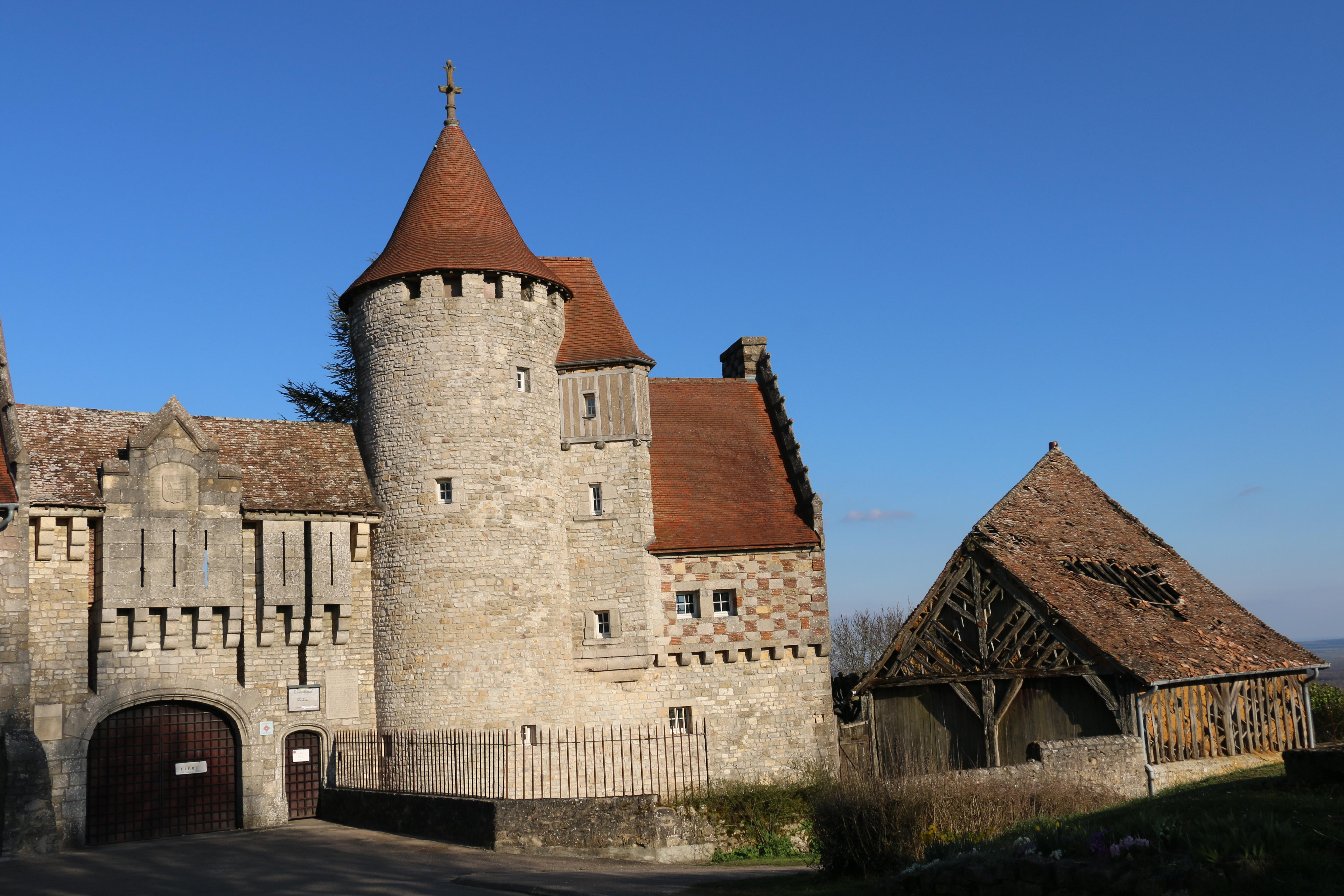 Schloss Hattonchatel, Ansicht von Westen.